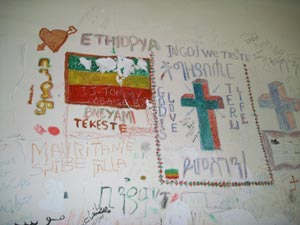 Bandiera dell'Etiopia disegnata su un muro nel vecchio campo di detenzione degli immigrati sull'isola di Samos, in Grecia